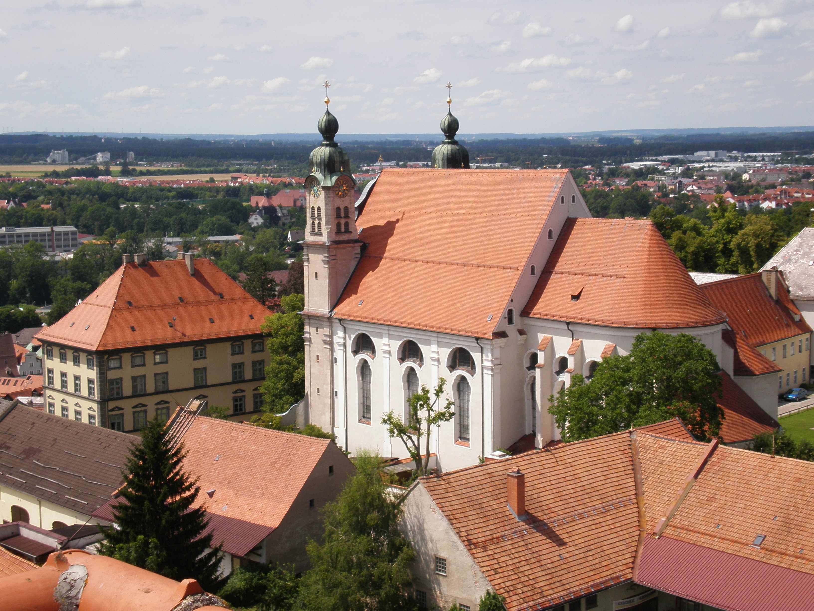 Heilig-Kreuz-Kirche und Neues Stadtmuseum (links) in Landsberg am Lech vom Bayertor aus gesehen